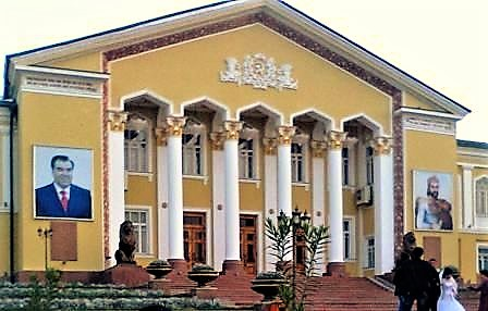 Дворец культуры "Арбоб" в Гафуровском районе (Таджикистан)Тоҷикӣ: Кохи "Арбоб" дар ноҳияи Ғафуров